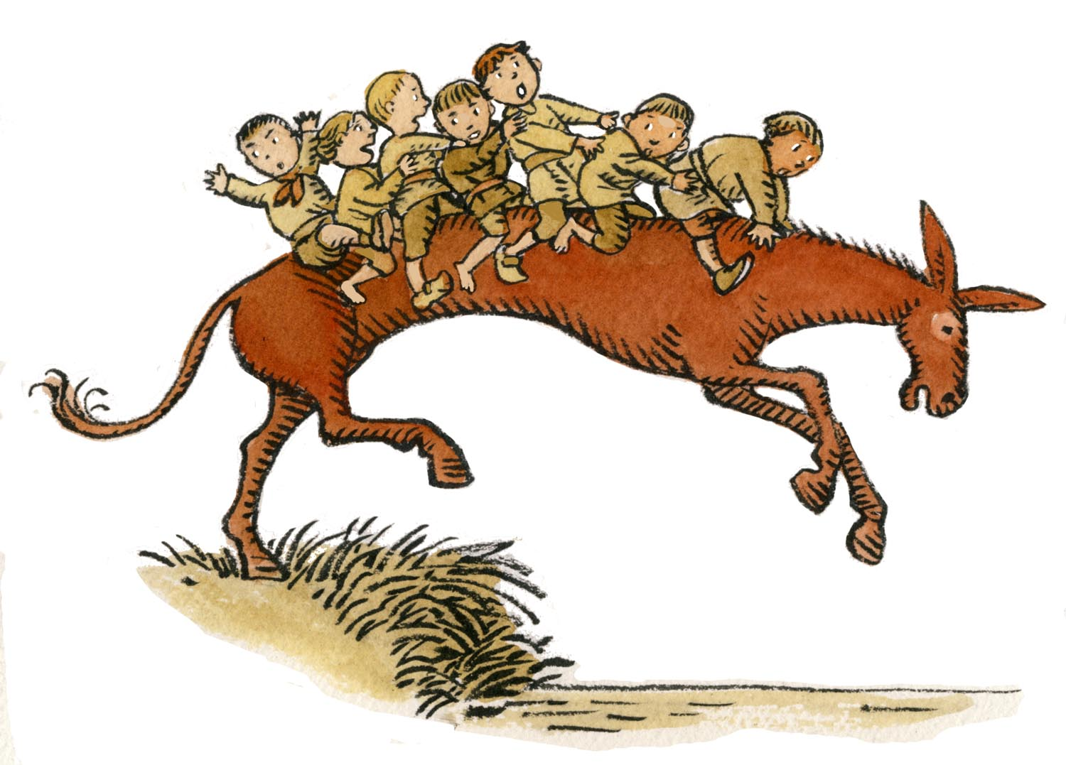 Drac, créature mythique : âne souvent rouge qui s'allonge pour prendre sur son dos de nombreux enfants, qu'il va ensuite noyer